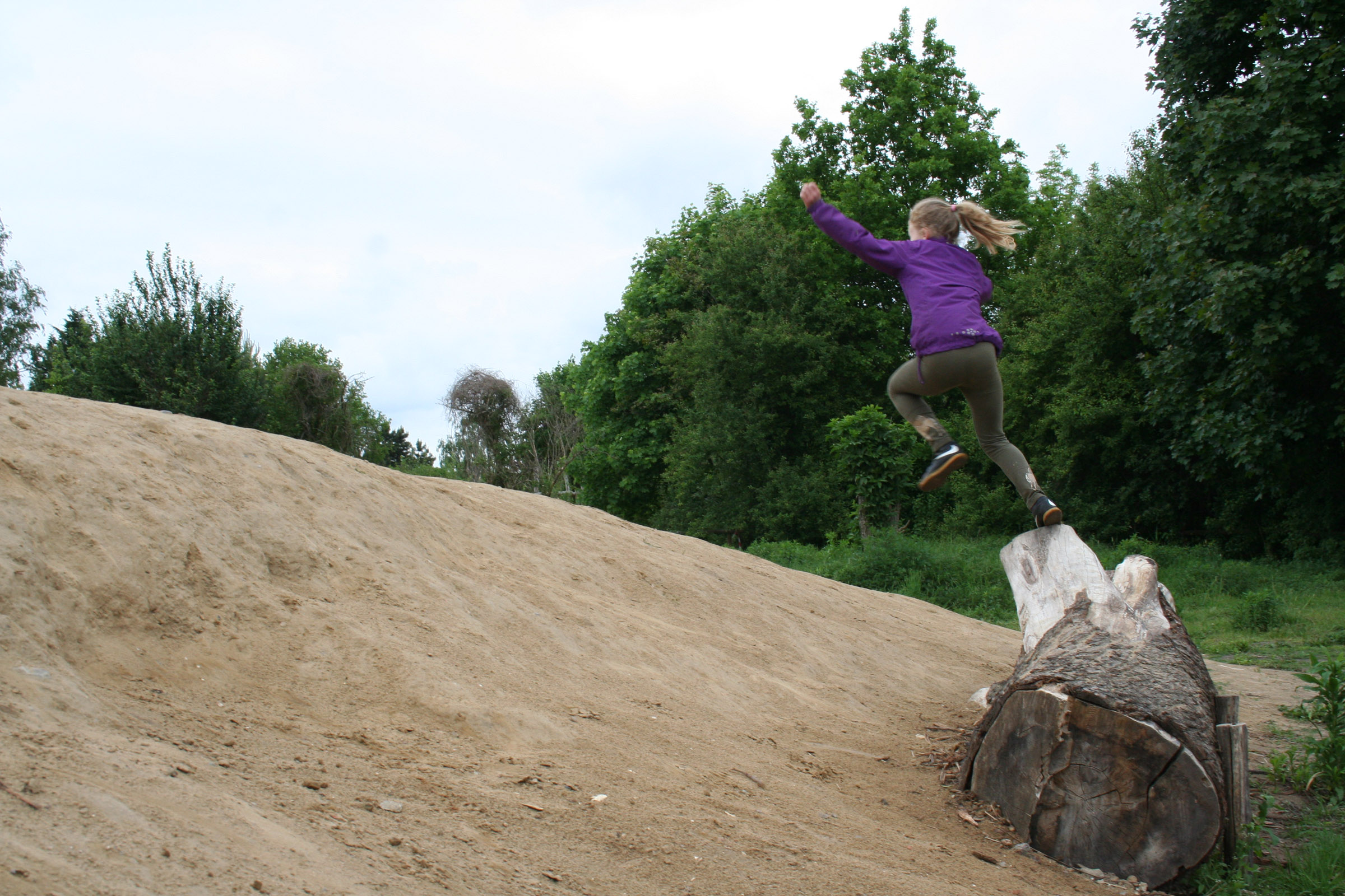 Springendes Kind im Naturerfahrungsraum Spieroweg in Berlin-Spandau